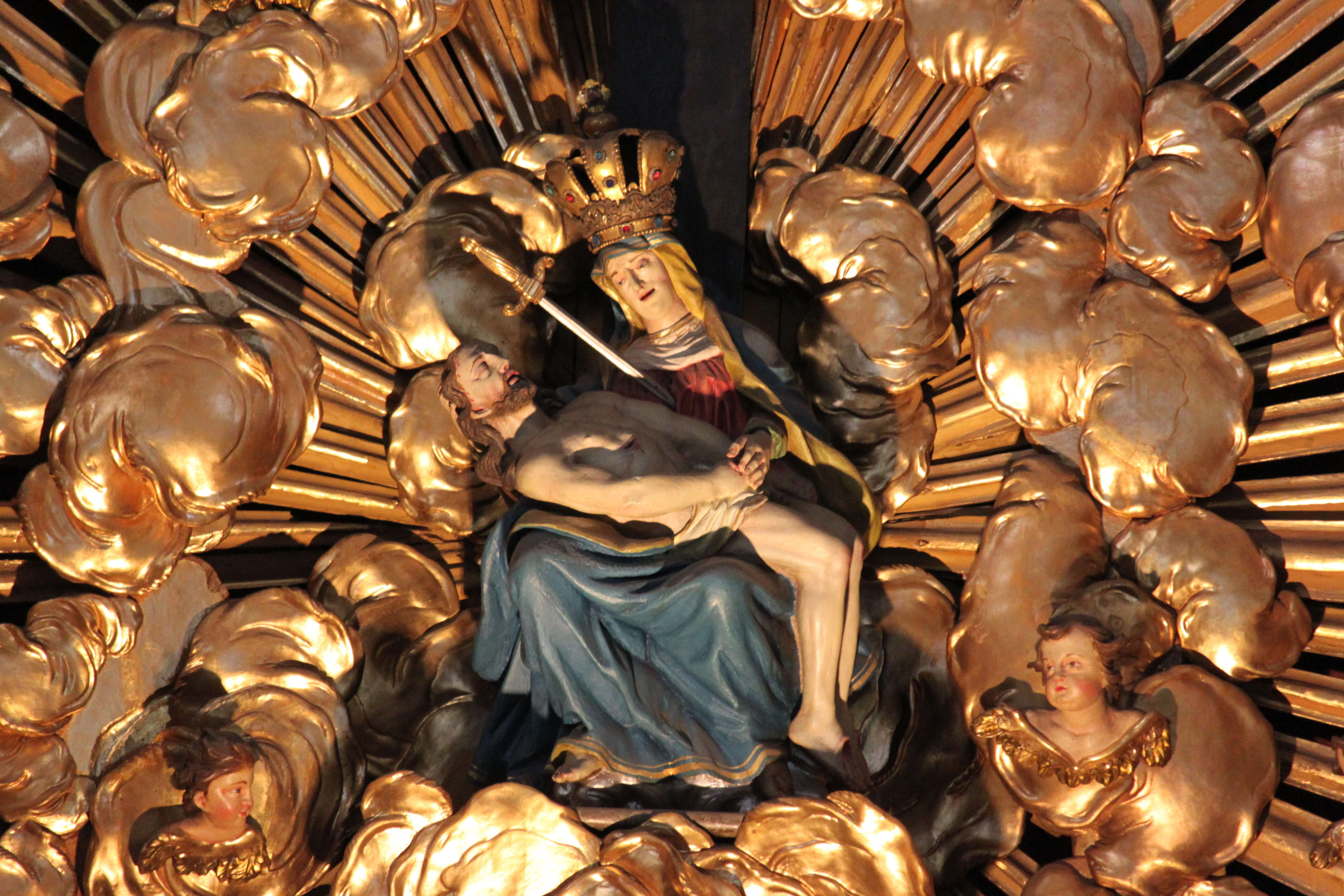 Kath. Filialkirche Sieben Schmerzen Mariä, Urbild Gnadenbild am Hochaltar